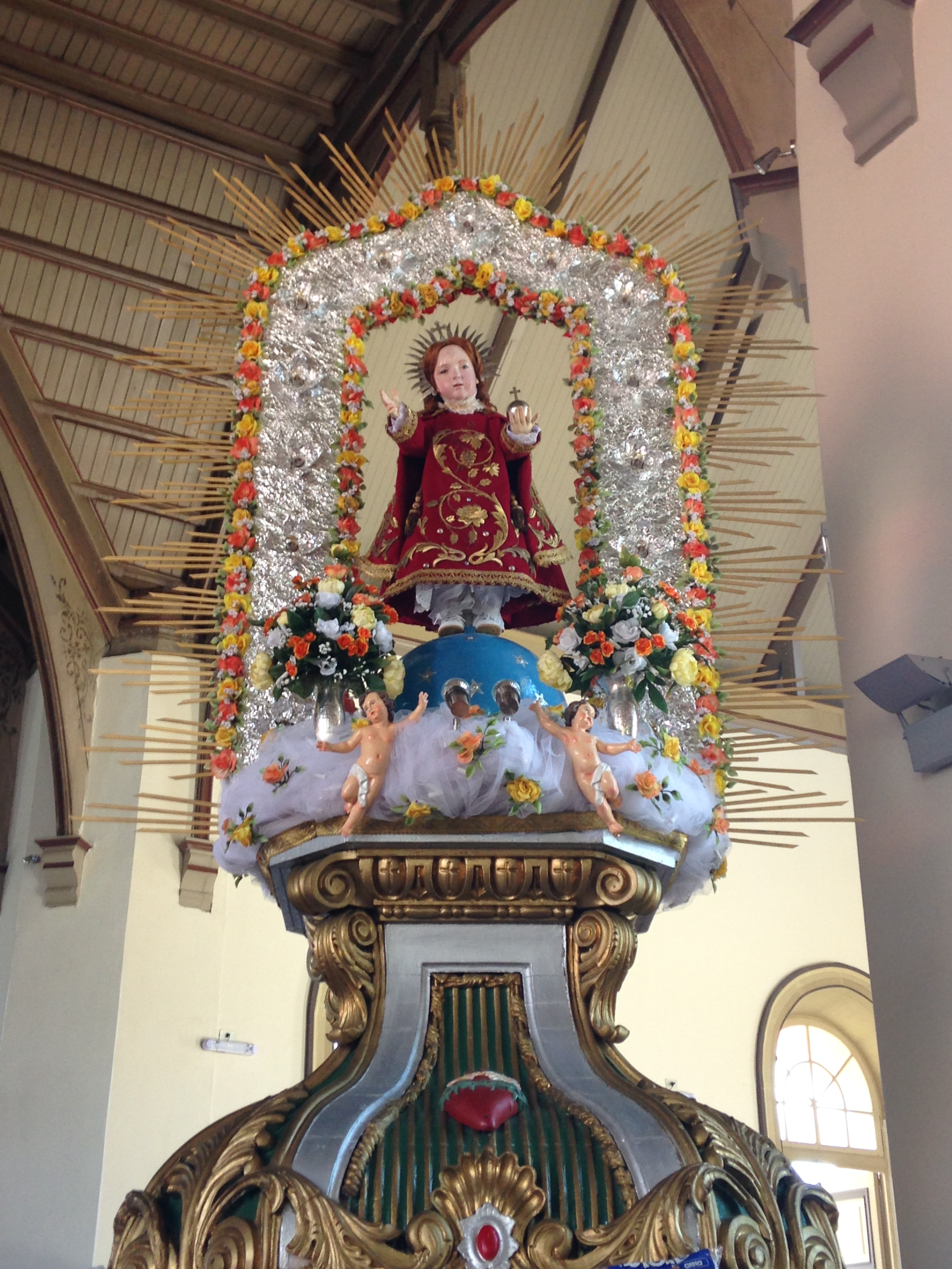 fiesta grande, enero de 2014